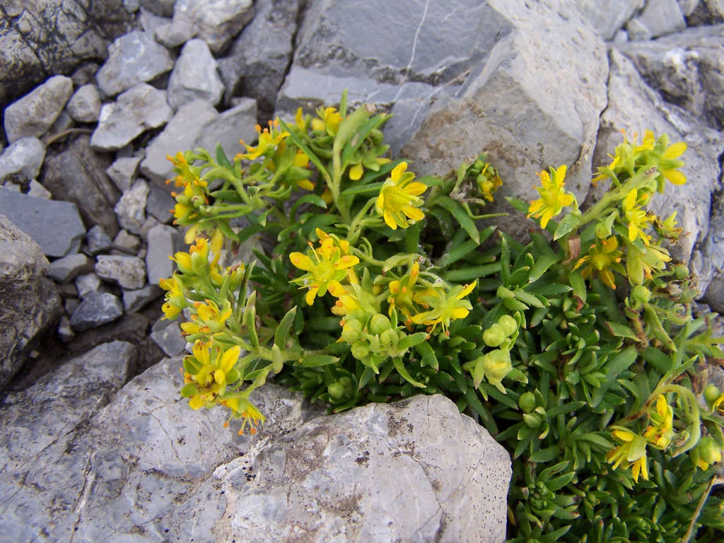 Saxigraga aizoides (pl. skalnica nakrapiana), habitat: Tatra Mountains, Czerwone Wierchy